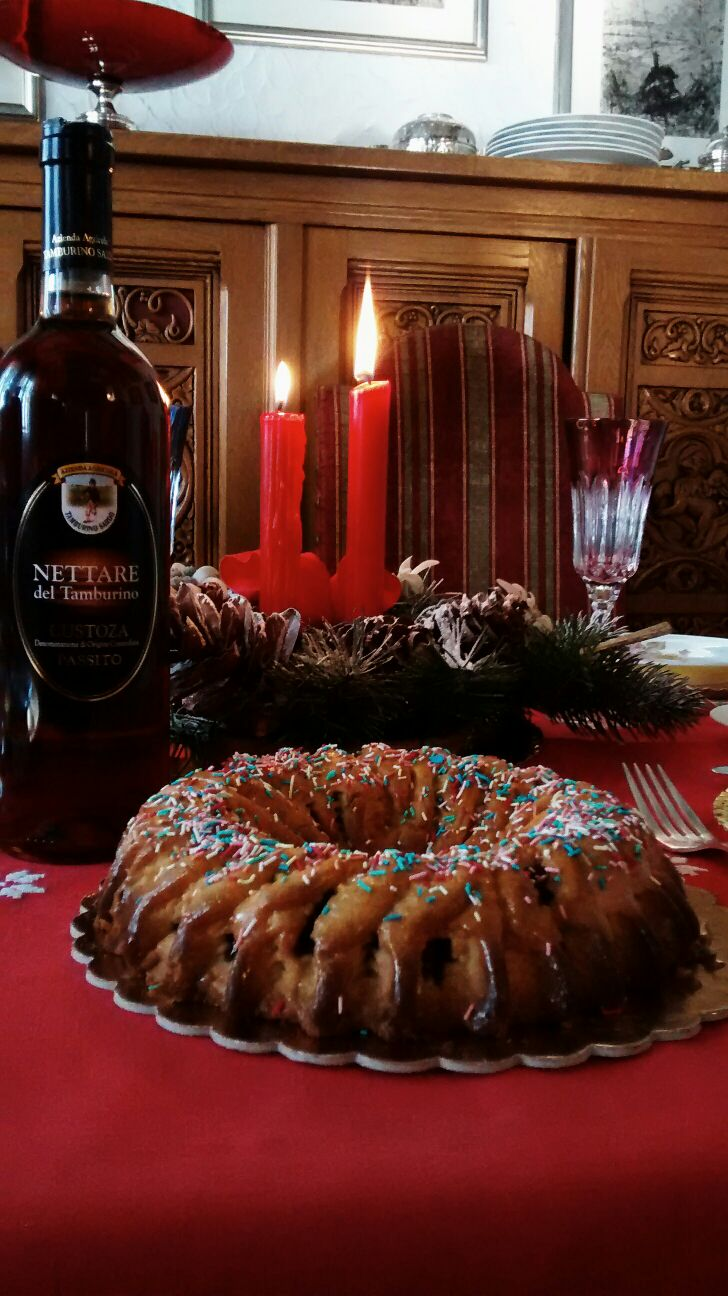 Buccellato Natale 2015 -foto di Giulia Baseggio